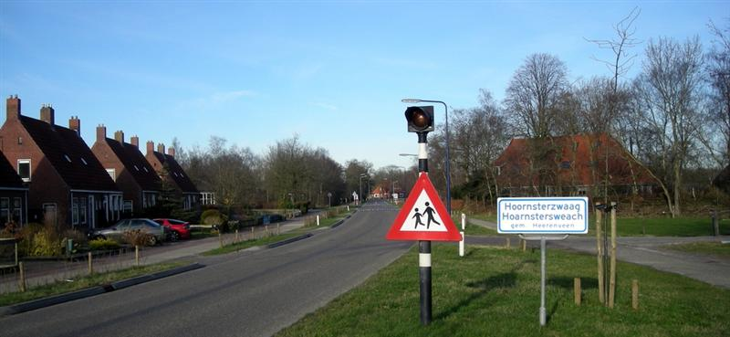 Hoornsterzwaag